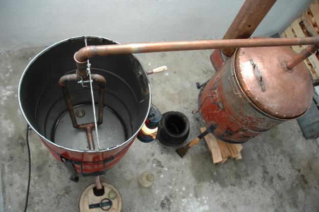 казан за варење на ракија